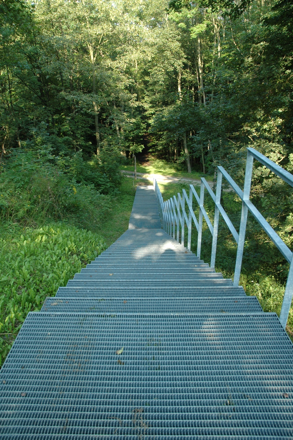 Zeitschneise vom Schloss Ettersburg zum ehem. KZ Buchenwald. Treppe in der Nähe des ehem. KZ Buchenwald